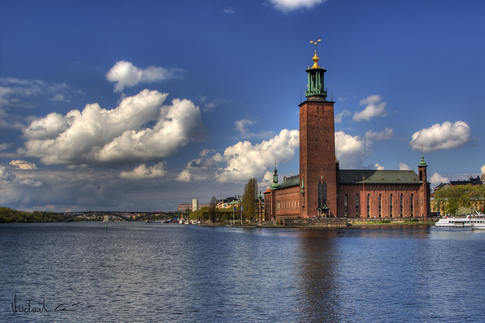 Stockholm City Hall "Stadshuset", Sweden.